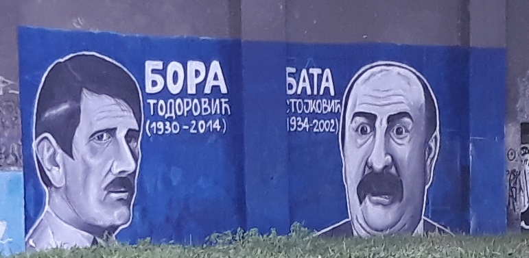 Мурали Боривоја „Боре“ Тодоровића и Данила „Бате“ Стојковића на фасади зграде у Земуну